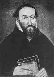 Zeitgenössisches Porträt des ersten Rektors der Klosterschule Ilfeld Michael Neander.